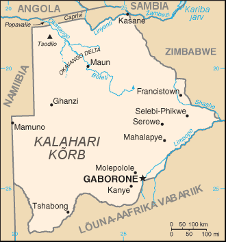 Botswana kaart